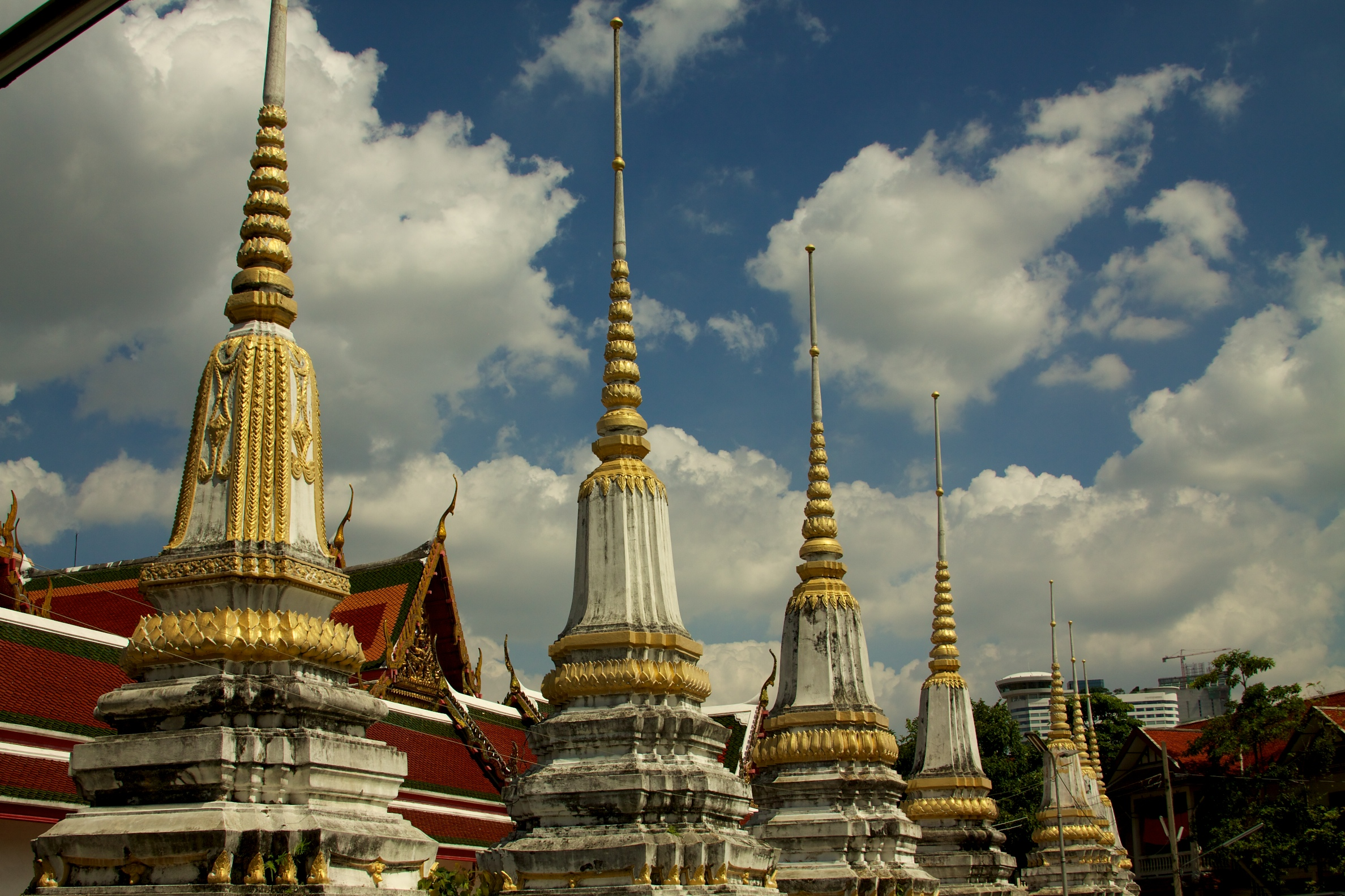 Stupas at Wat Pathumkongka